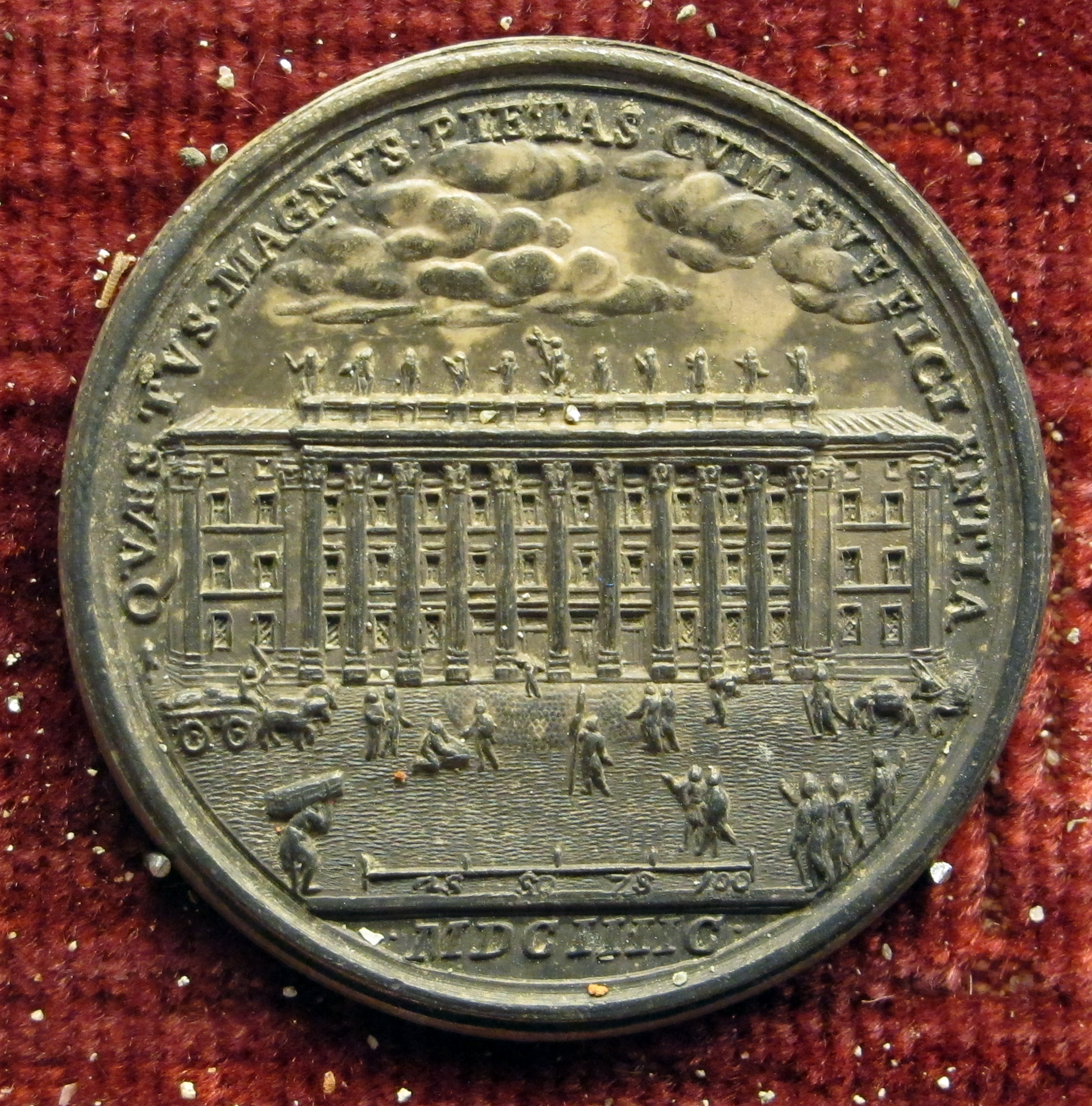 Medaglie romane '600-'700